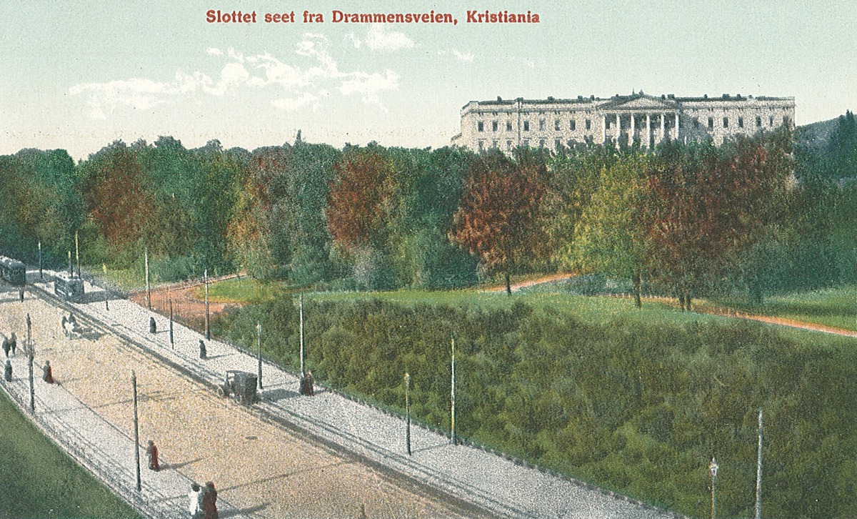 Slottet seet fra Drammensveien, Kristiania, park, Slottet, gate, biler, mennesker.